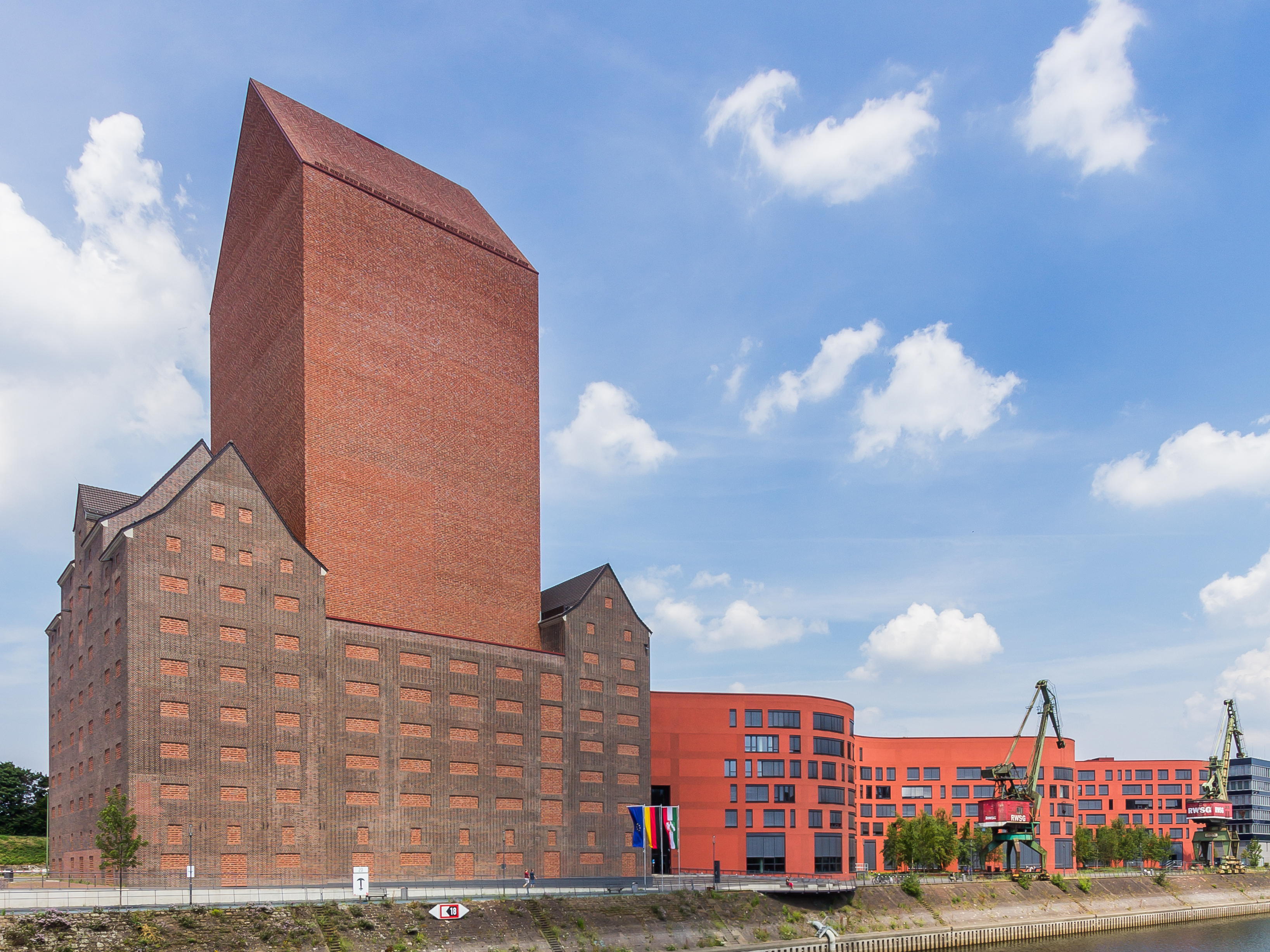 Landesarchiv NRW Duisburg - Magazin im RWSG Speicher. Ansicht über den Innenhafen hinweg